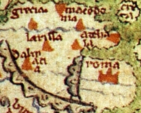 Psalter world map, Roma